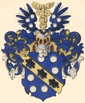 Reuterni suguvõsa aadlivapp